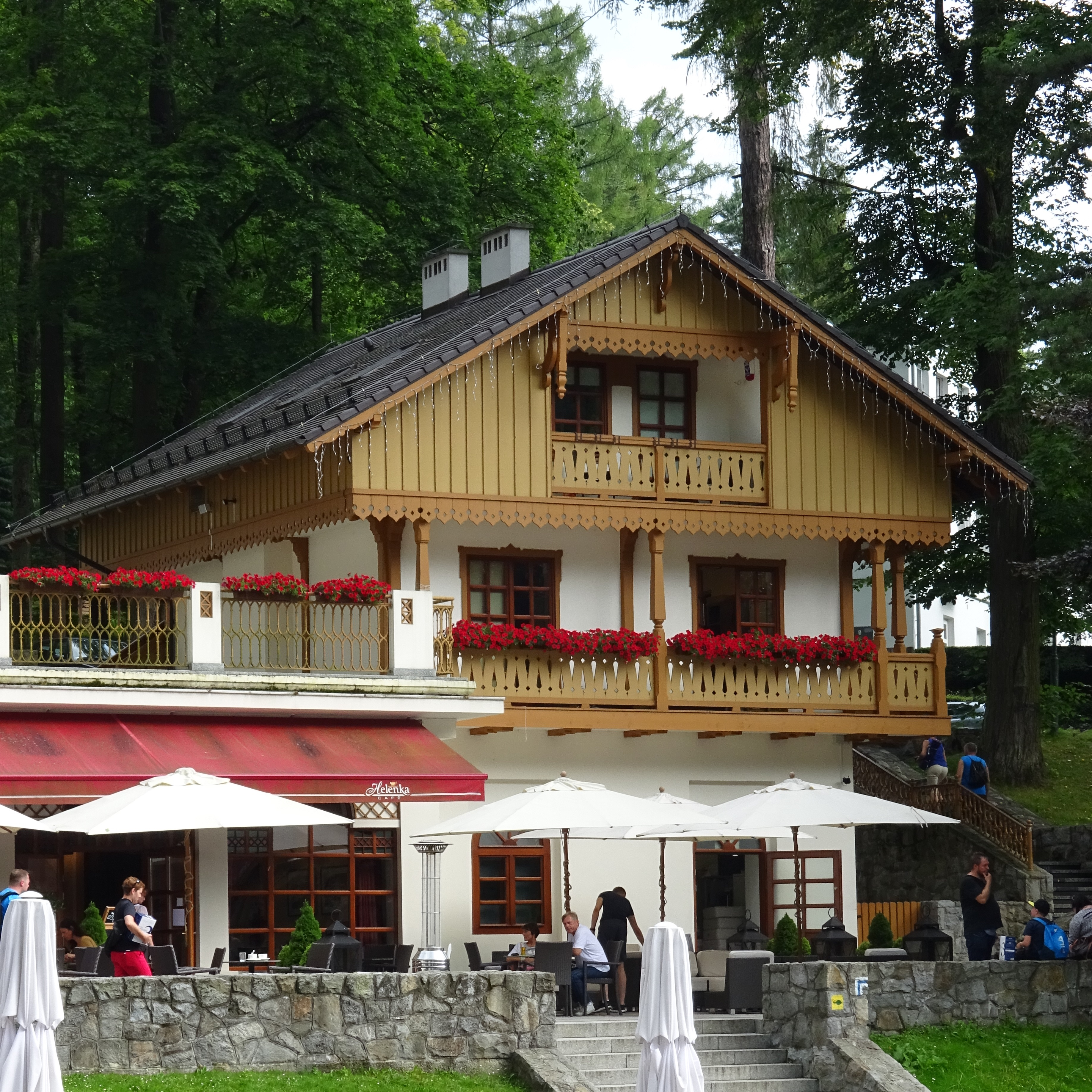 Willa Szwajcarka Górna w Szczawnicy. Widok z ul. Języki. 2016